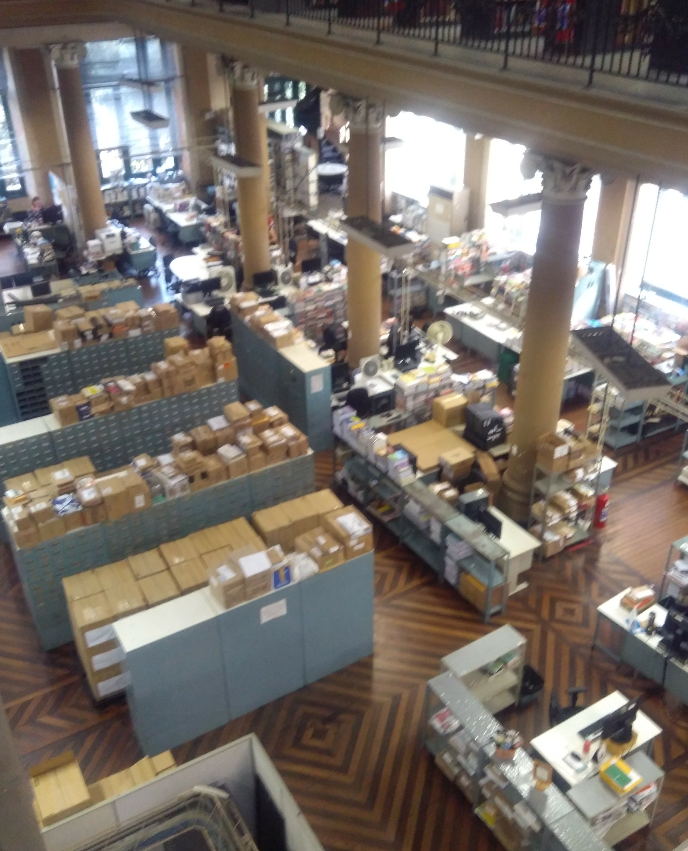 Biblioteca Nacional do Brasil, processamento técnico